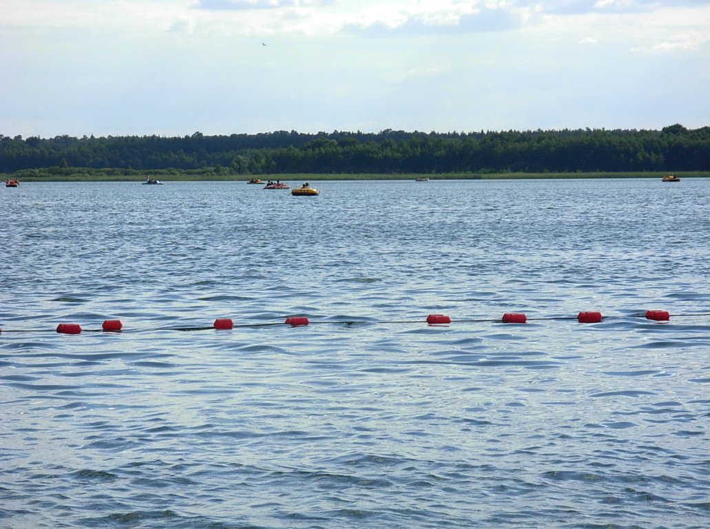 Jezioro Ostrowskie w Przyjezierzu